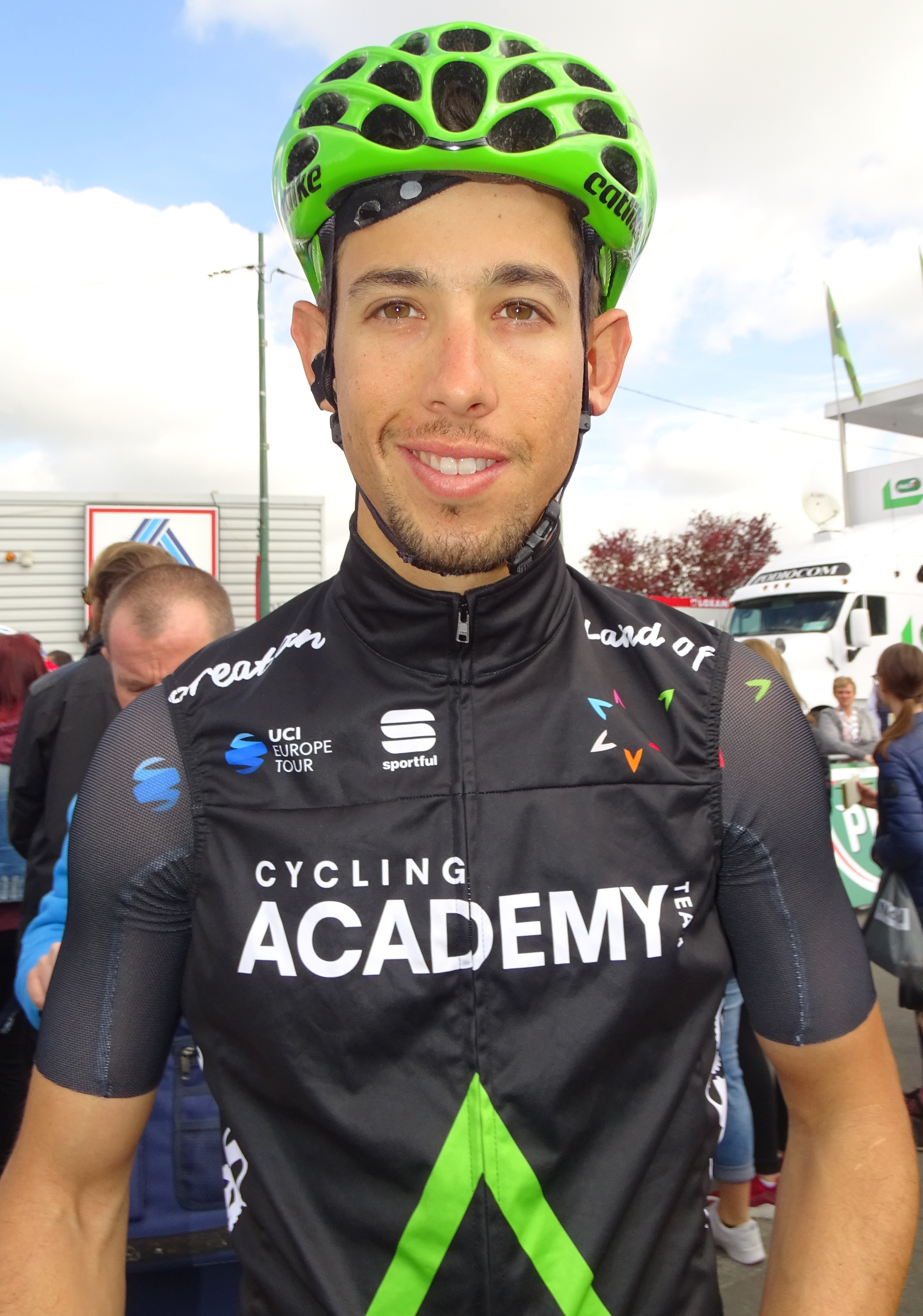 Reportage réalisé le jeudi 13 avril à l'occasion du départ et de l'arrivée du Grand Prix de Denain 2017 à Denain, Nord, Nord-Pas-de-Calais-Picardie, France.